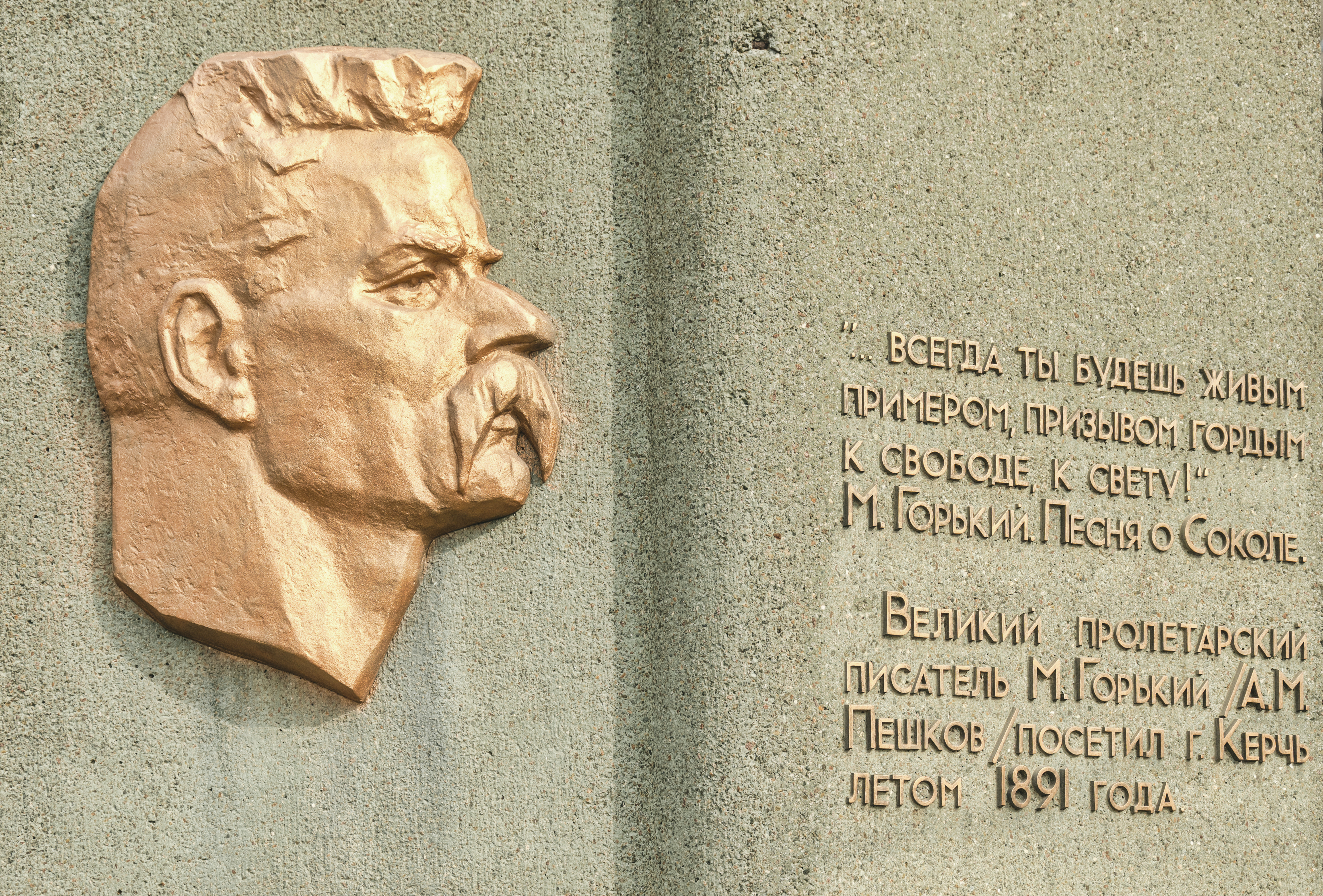 Памятный знак в честь пребывания М.Горького в г.Керчи: угол улица Горького и улица Гайдара, Керчь, Крым This object is located on the Crimean Peninsula and recognized as cultural heritage by both Russia and Ukraine under the monument ID: 8230472000/ 01-112-0078, respectively. The legal status of the Crimean region is currently disputed.